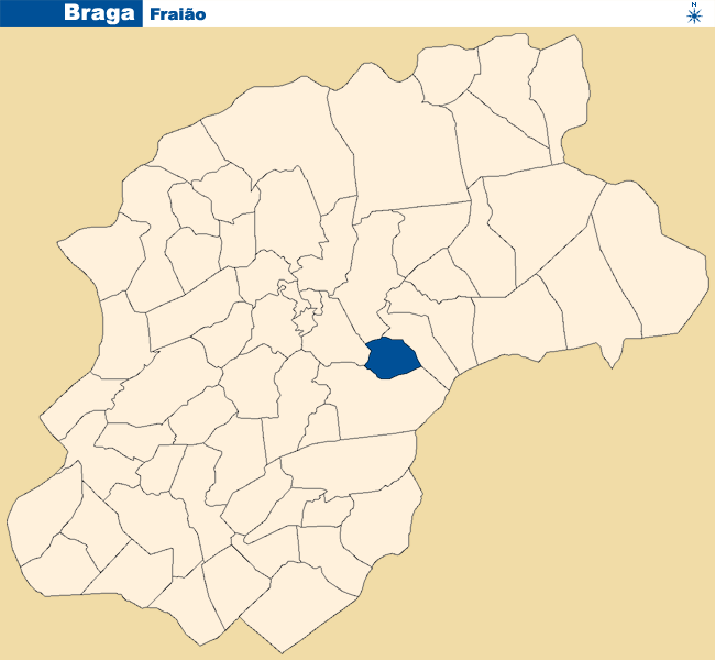 Localização de Fraião no concelho de Braga.